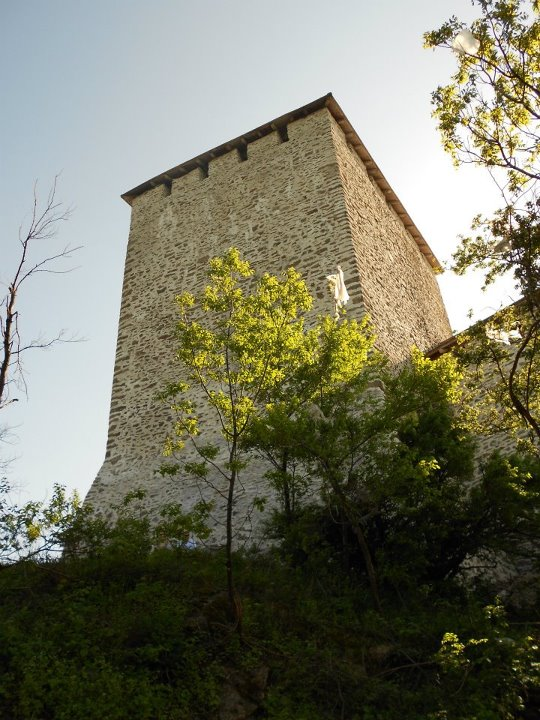 Источна страна Замка.